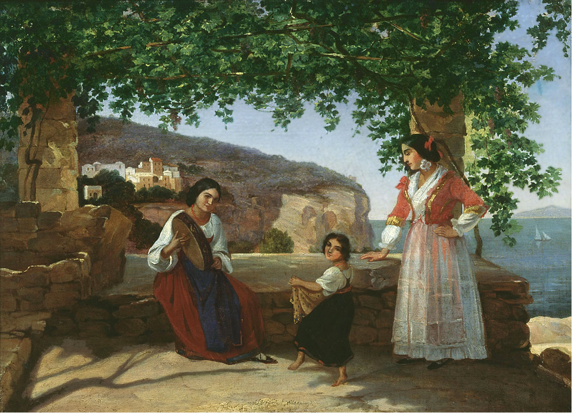 Roma. Italian Women on the Terrace (Tarantella).label QS:Lru,"Рим. Итальянки на террасе"